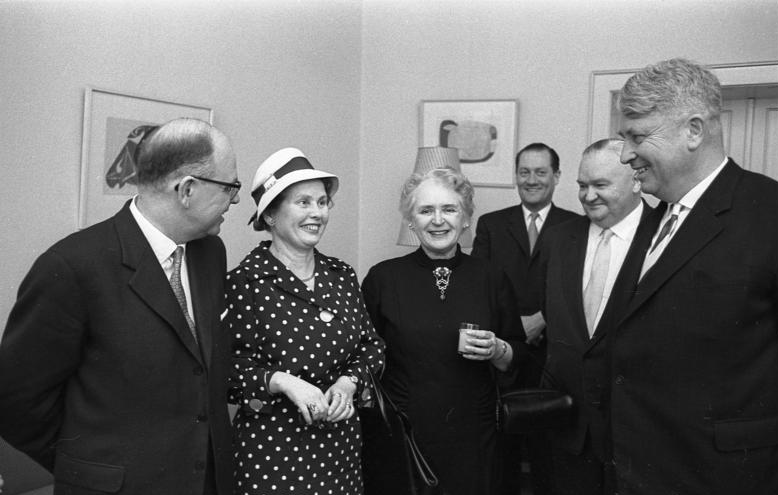 Generaldirektor Oittinen, Leiter der obersten finnischen Schulbehörde Frühstück gegeben von Ministerialdirektor und Frau Sattler für Generaldirektor und Frau Oittinen, Finnland, Presseclub v.l.n.r.: Hr. Oittinen, Frau Oittinen, Frau von Harlem, Gen. Konsul Helenius, Dr. Kitt, Dr. Dieter Sattler